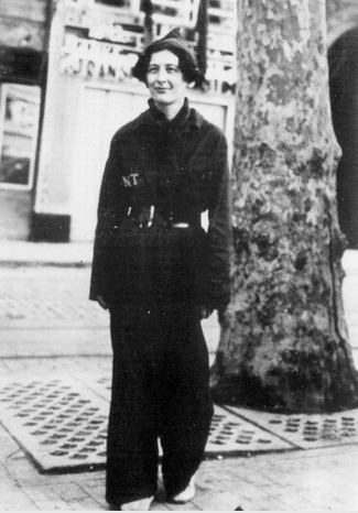 スペインにて:1936